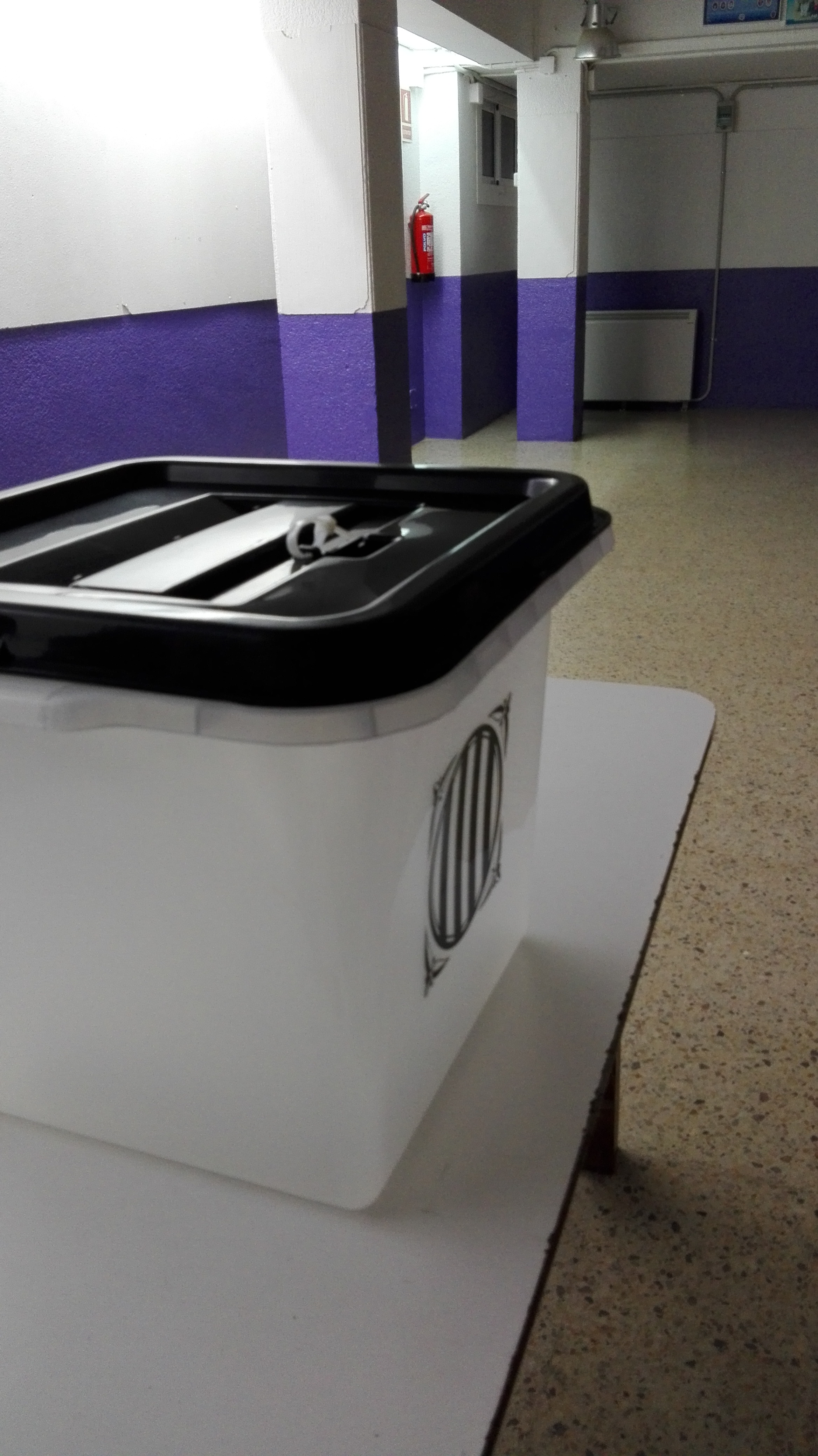 Urna a l'escola El Dofí de Premià de Mar abans de començar la votació del Referèndum d'autodeterminació de 2017.